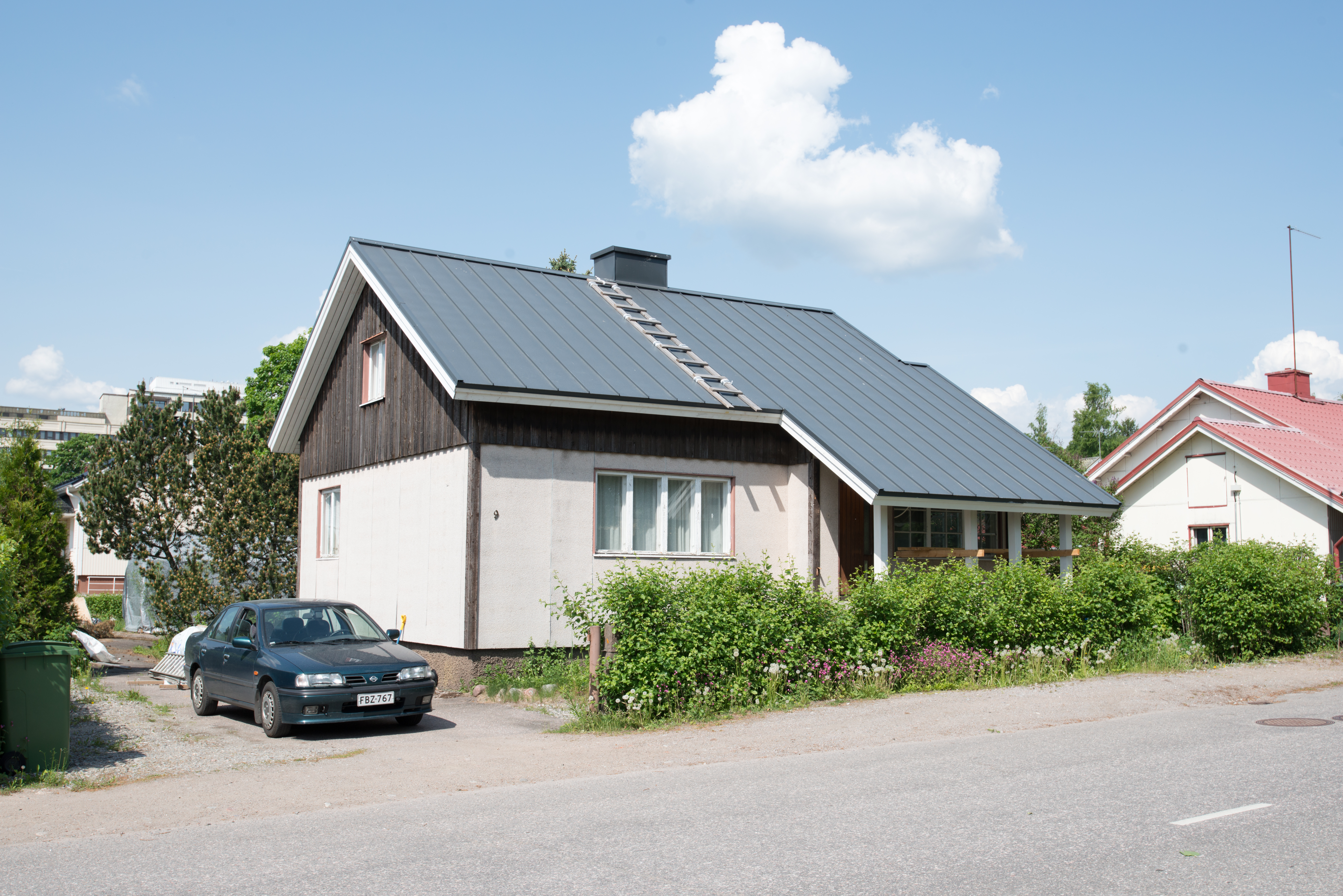 Karjalankatu 9, Salo